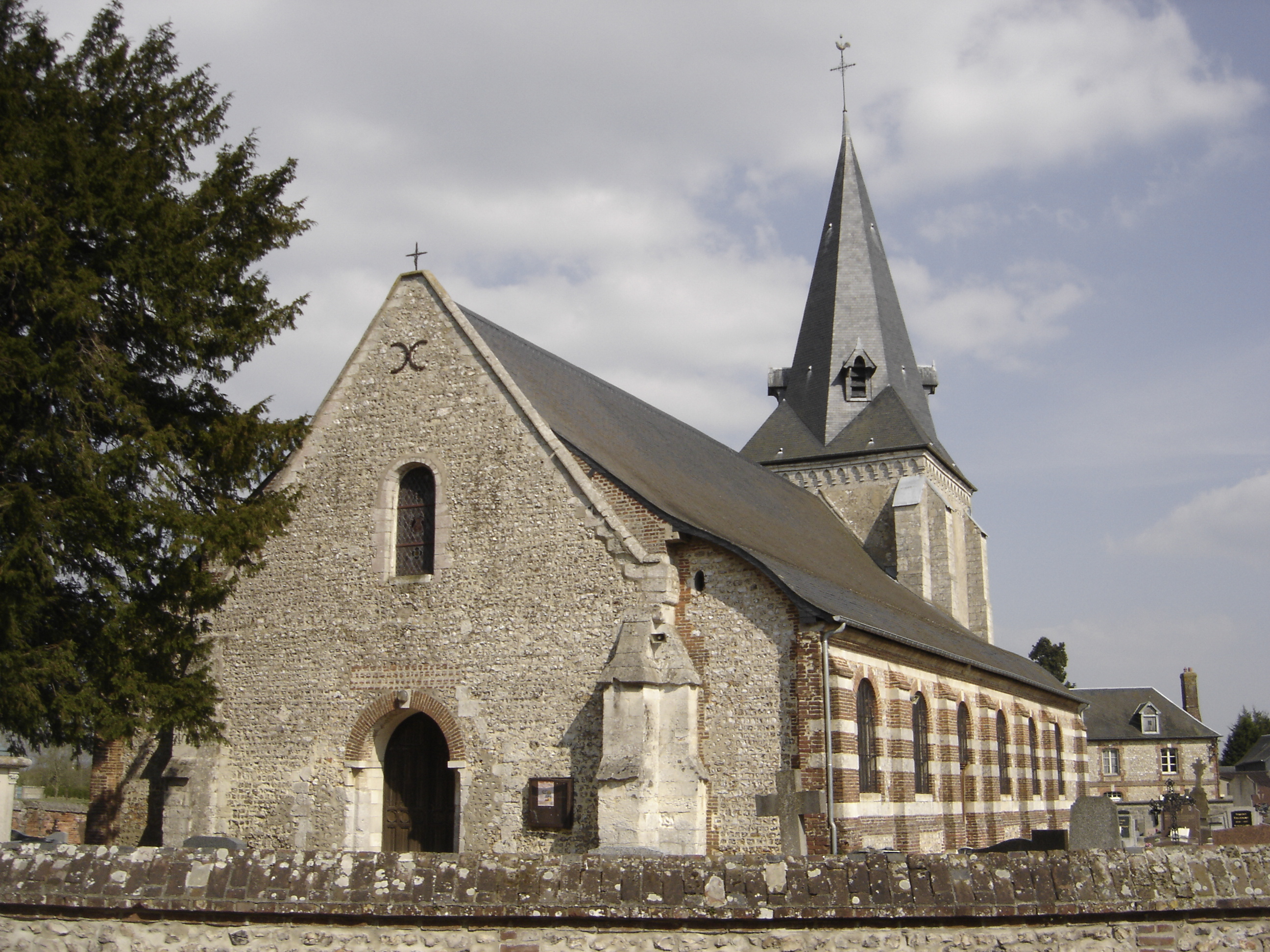 Eglise de Bourneville - Eure - France